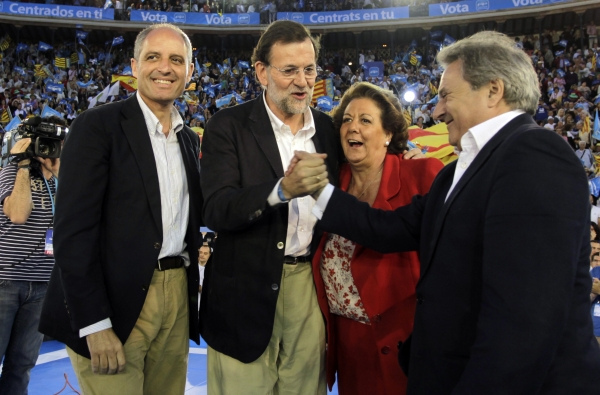 Rajoy en València.